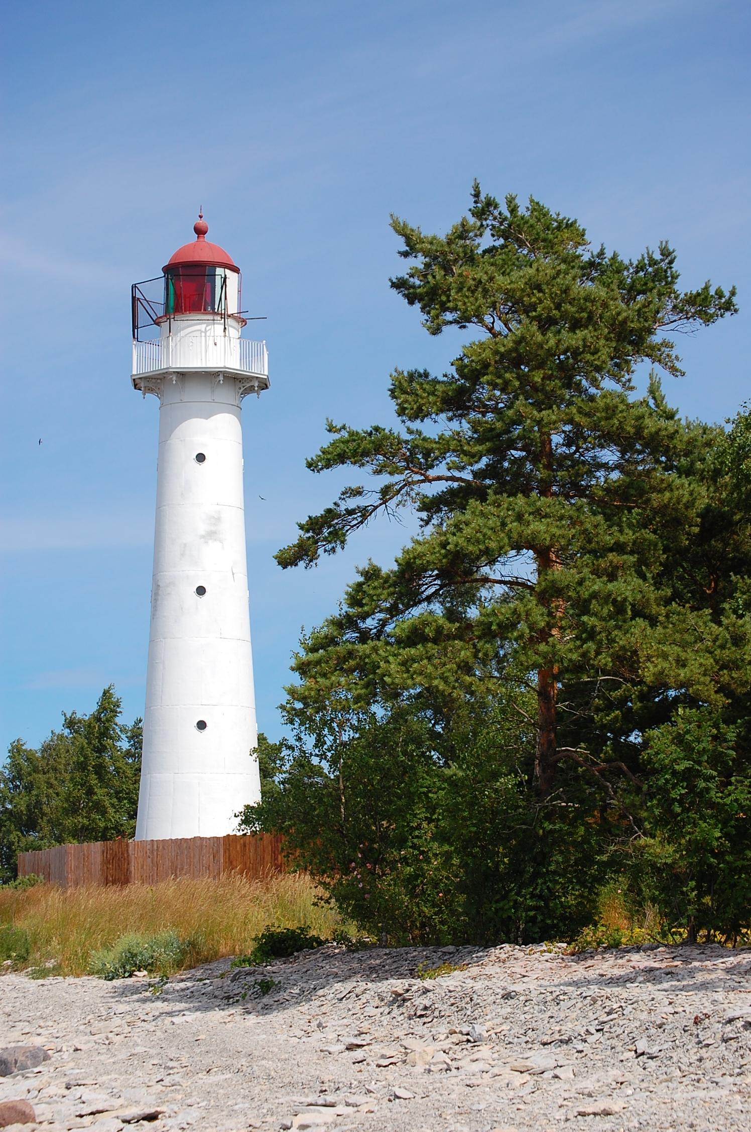 Vormsi tuletorn, Saxby küla